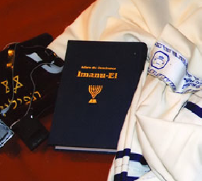 Sidur Reformsta ImanuEl, Reuben Nisenbom